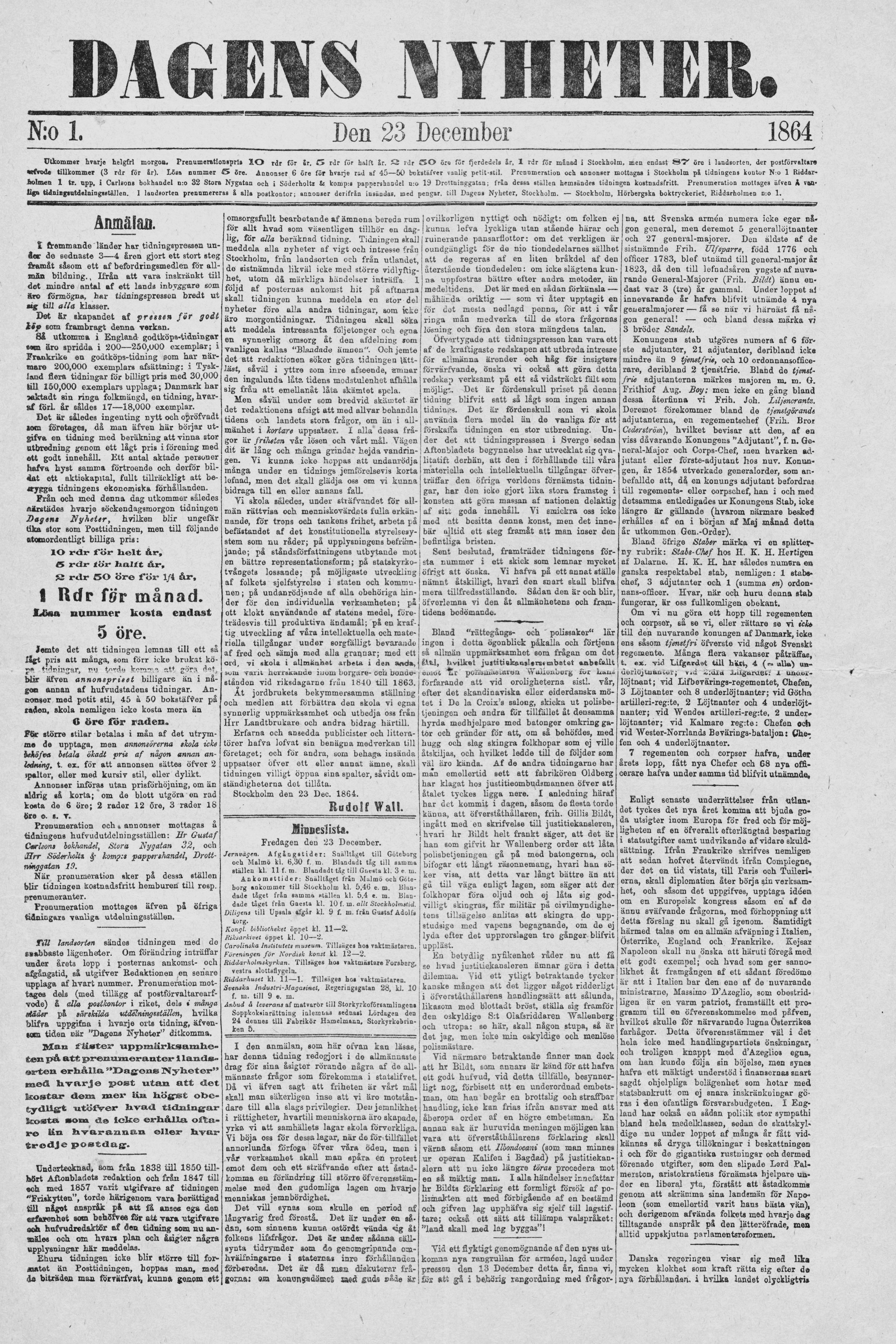 Dagens Nyheter 23 december 1864, första numret.